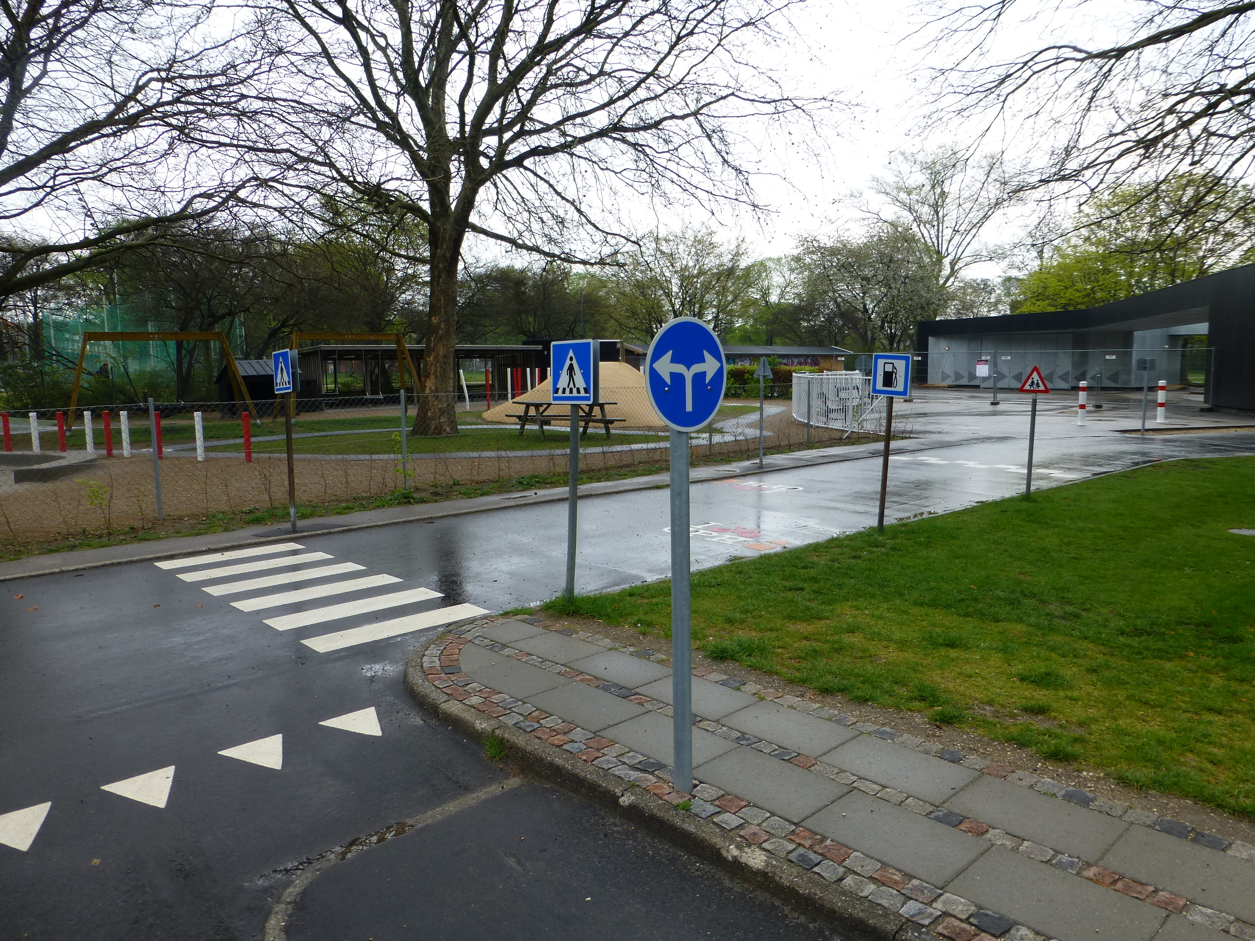 The traffic playground Trafiklegepladsen in Fælledparken in Copenhagen.